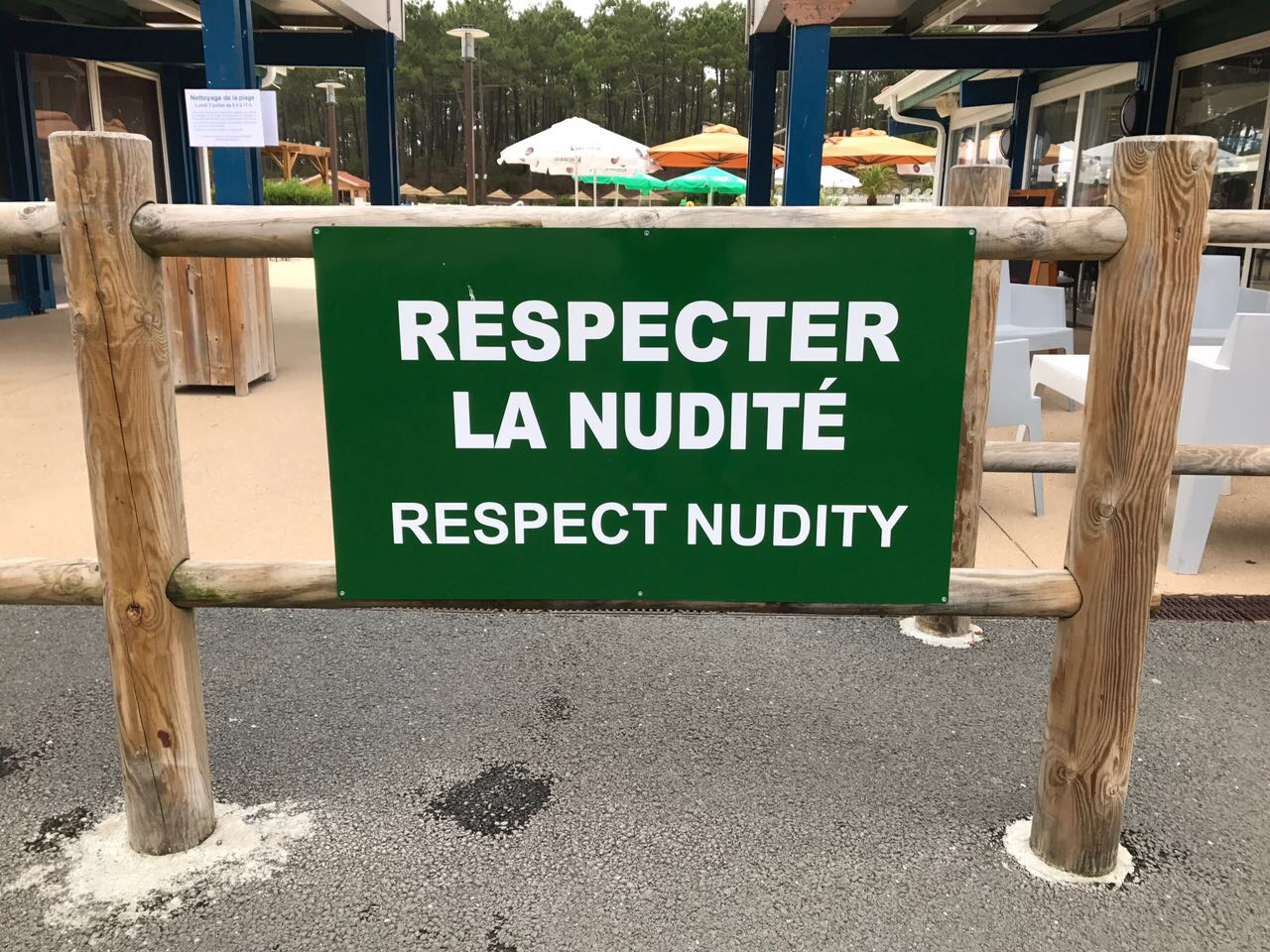 Schild in La Jenny, Gironde